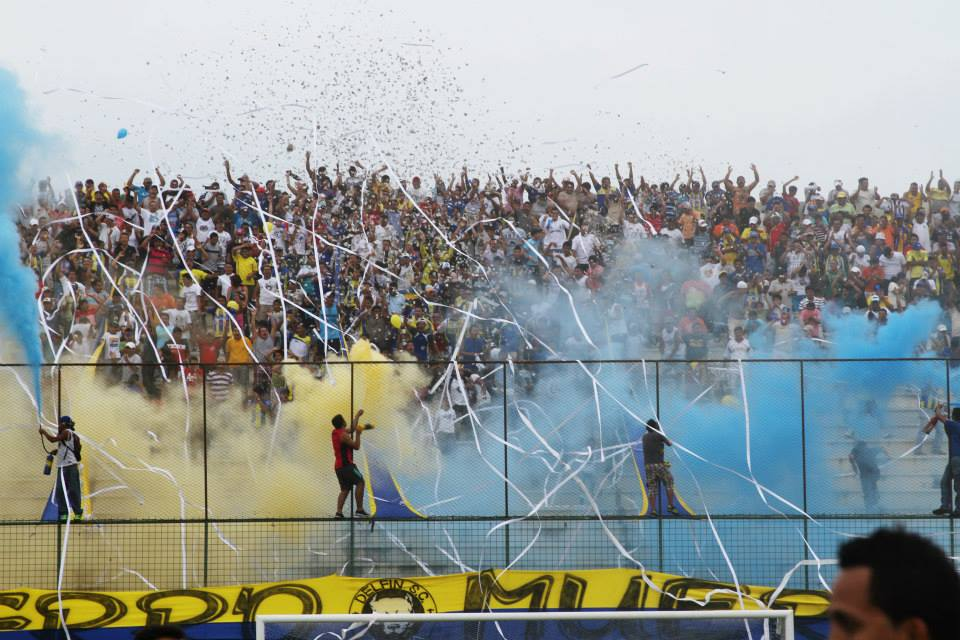 Perro Muerto recibiendo al Delfin